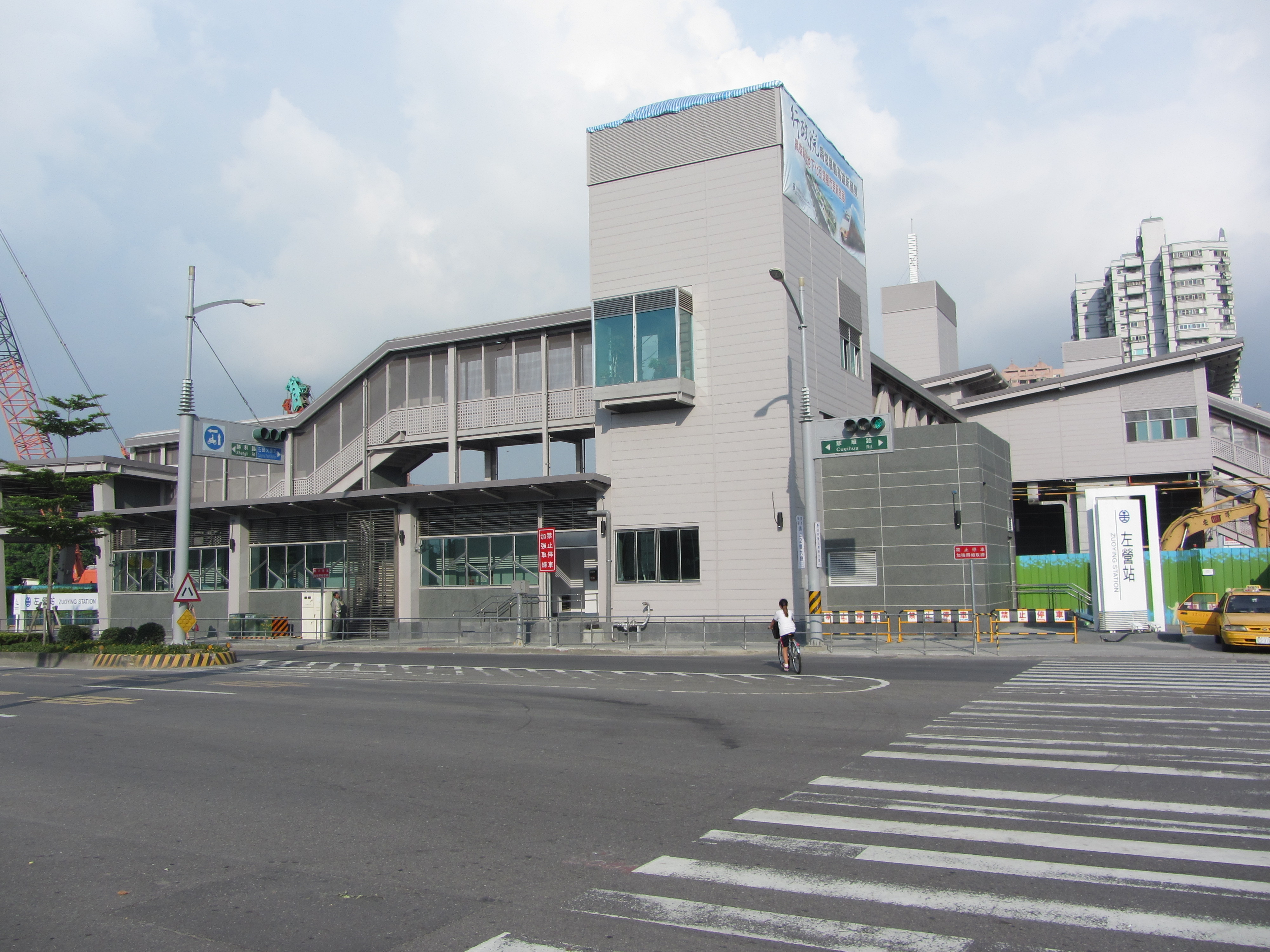 左營車站臨時站房